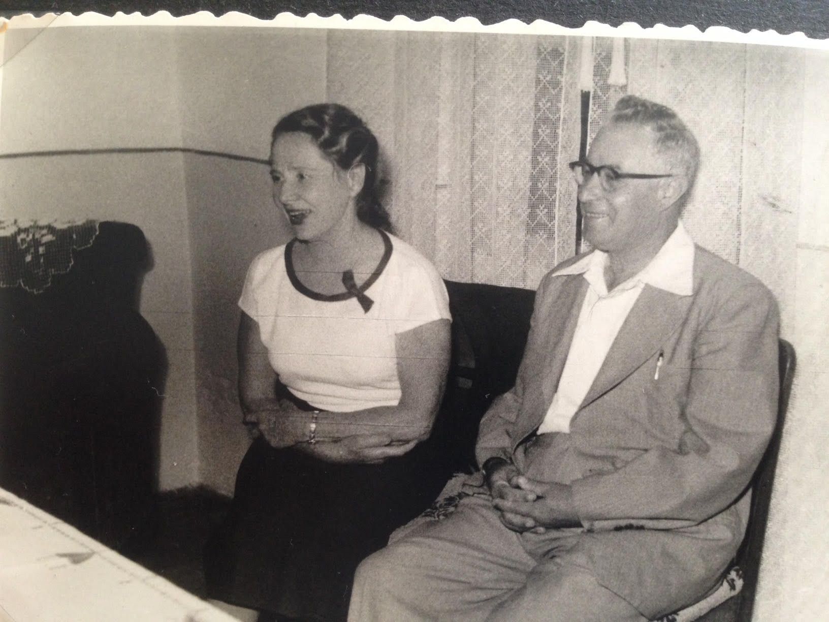 יחזקאל ריבנאי ורבקה אהרונסון